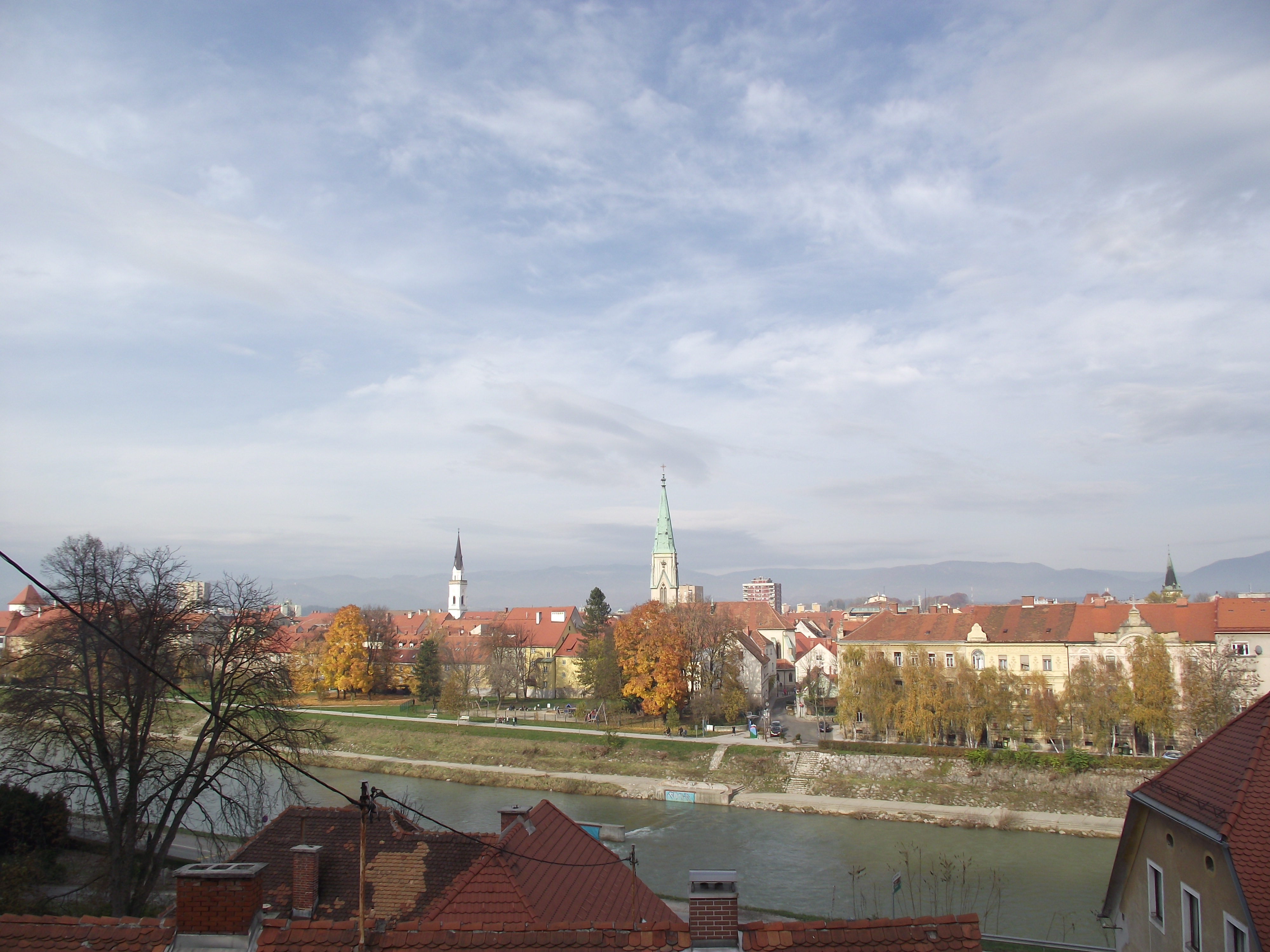 Celje